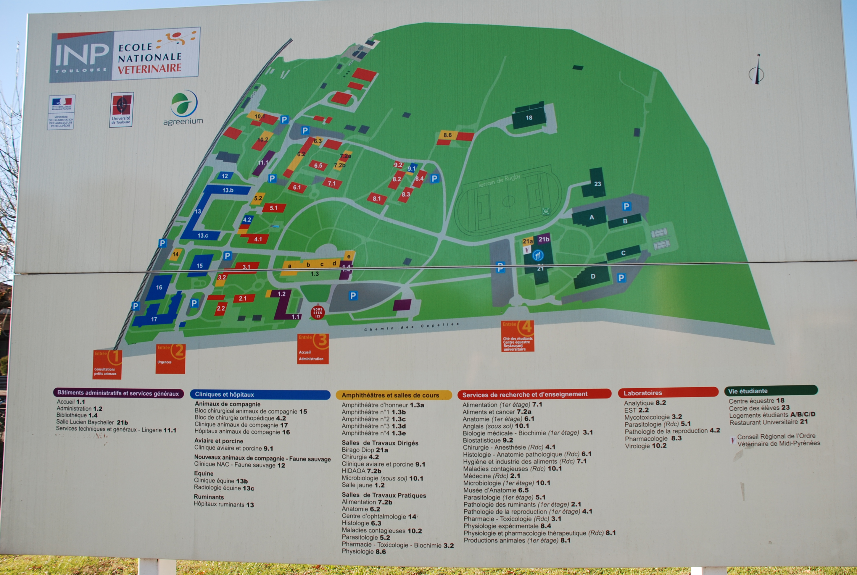 Plan , accueil de École nationale vétérinaire de Toulouse, France